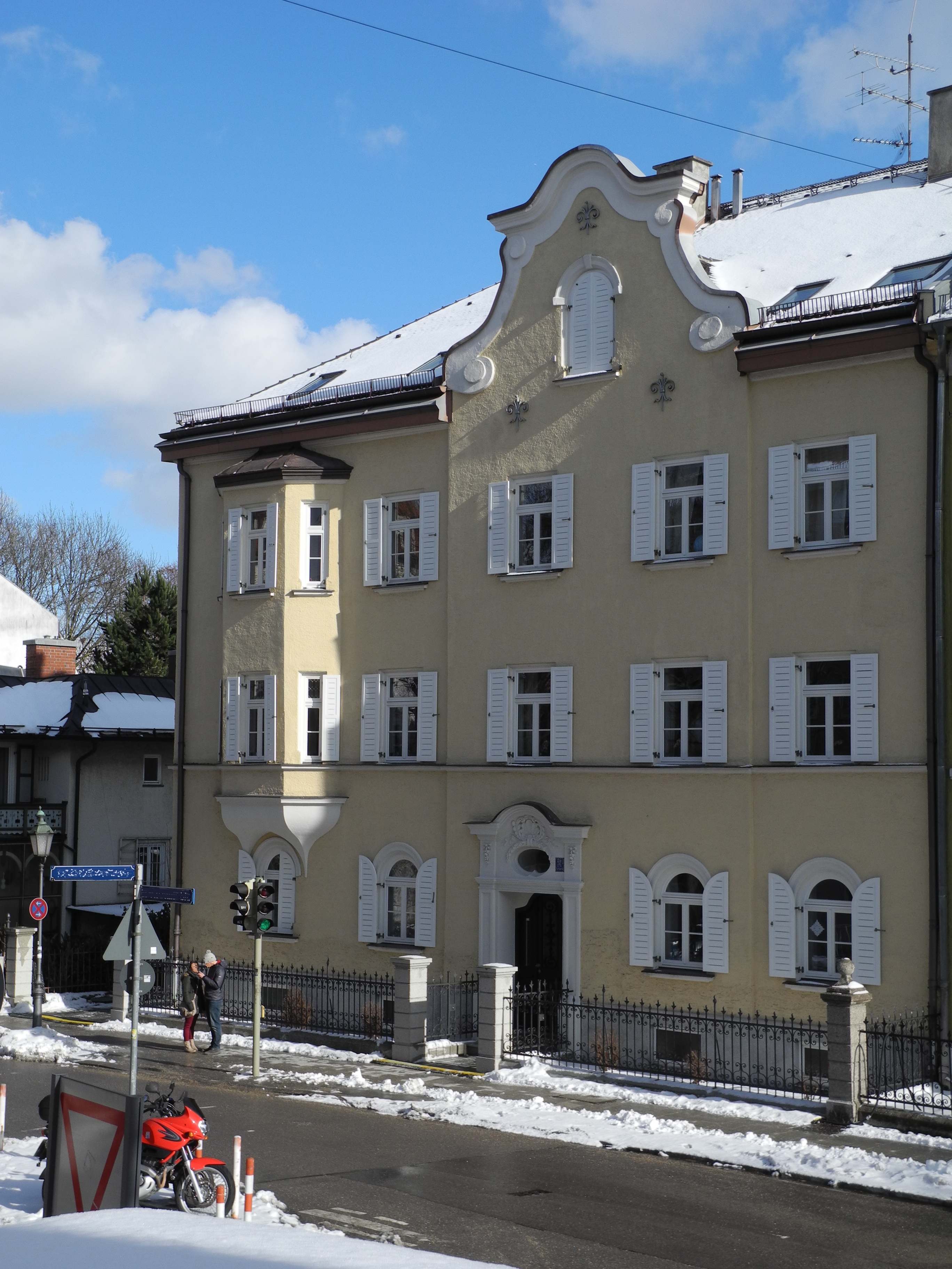 Das Wohnhaus um 1958 - 1960 von Constanze Schwedeler in München-Schwabing